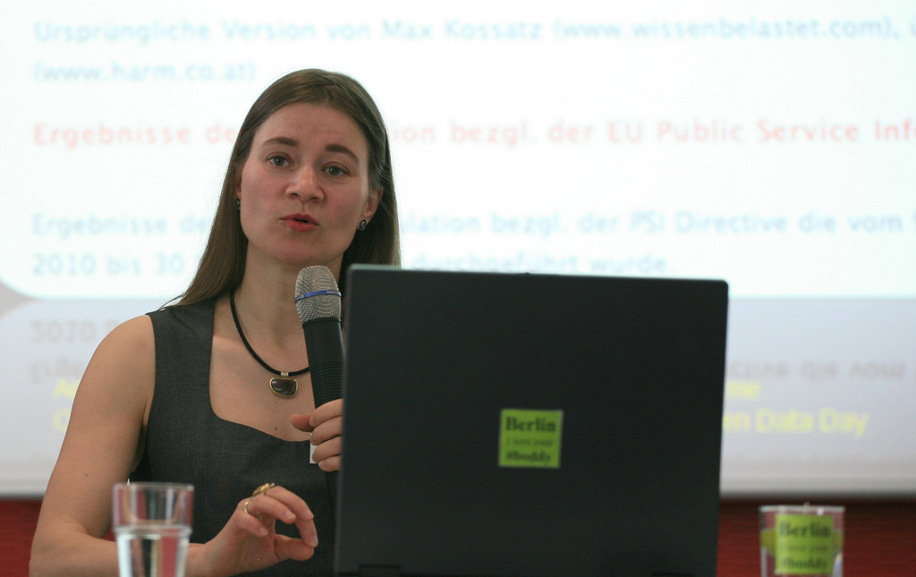 Offene Verwaltung – Partizipation und Teilhabe (Anke Domscheit-Berg, gov2.0-Netzwerk) Foto: Michael Hörz